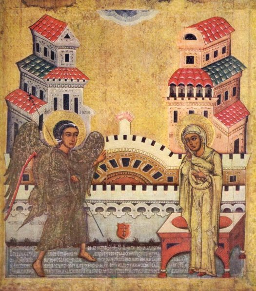 "Благовіщення".